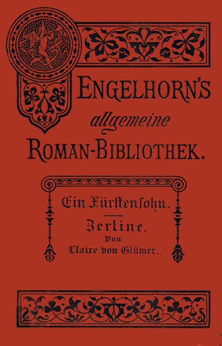 Cover von Claire von Glümers Buch Ein Fürstensohn. Zerline, erschienen 1886.